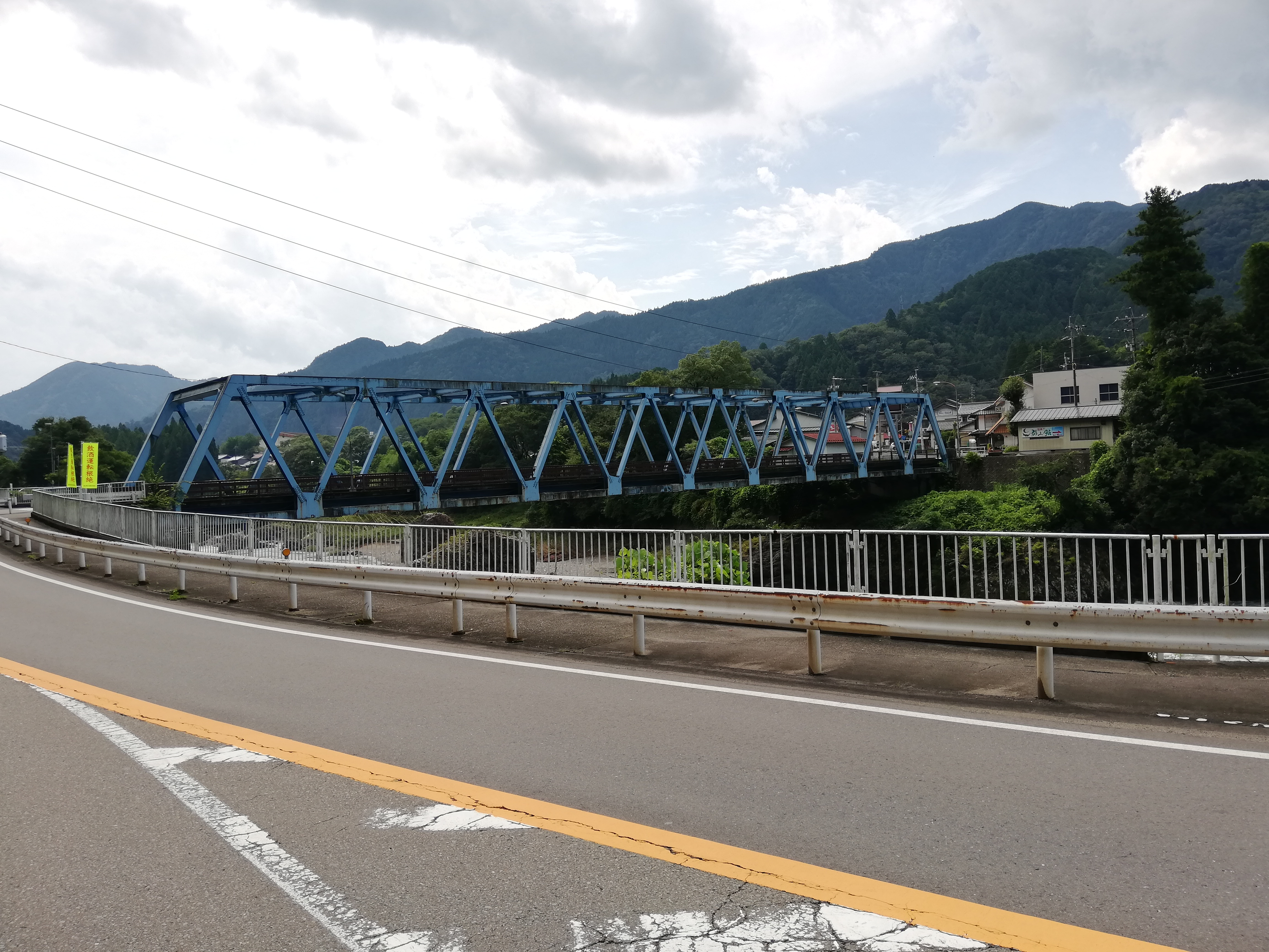 長良川に架かる法伝橋。この橋は2代目で、初代は下流側であった。南に隣接して初代の橋台が残る。